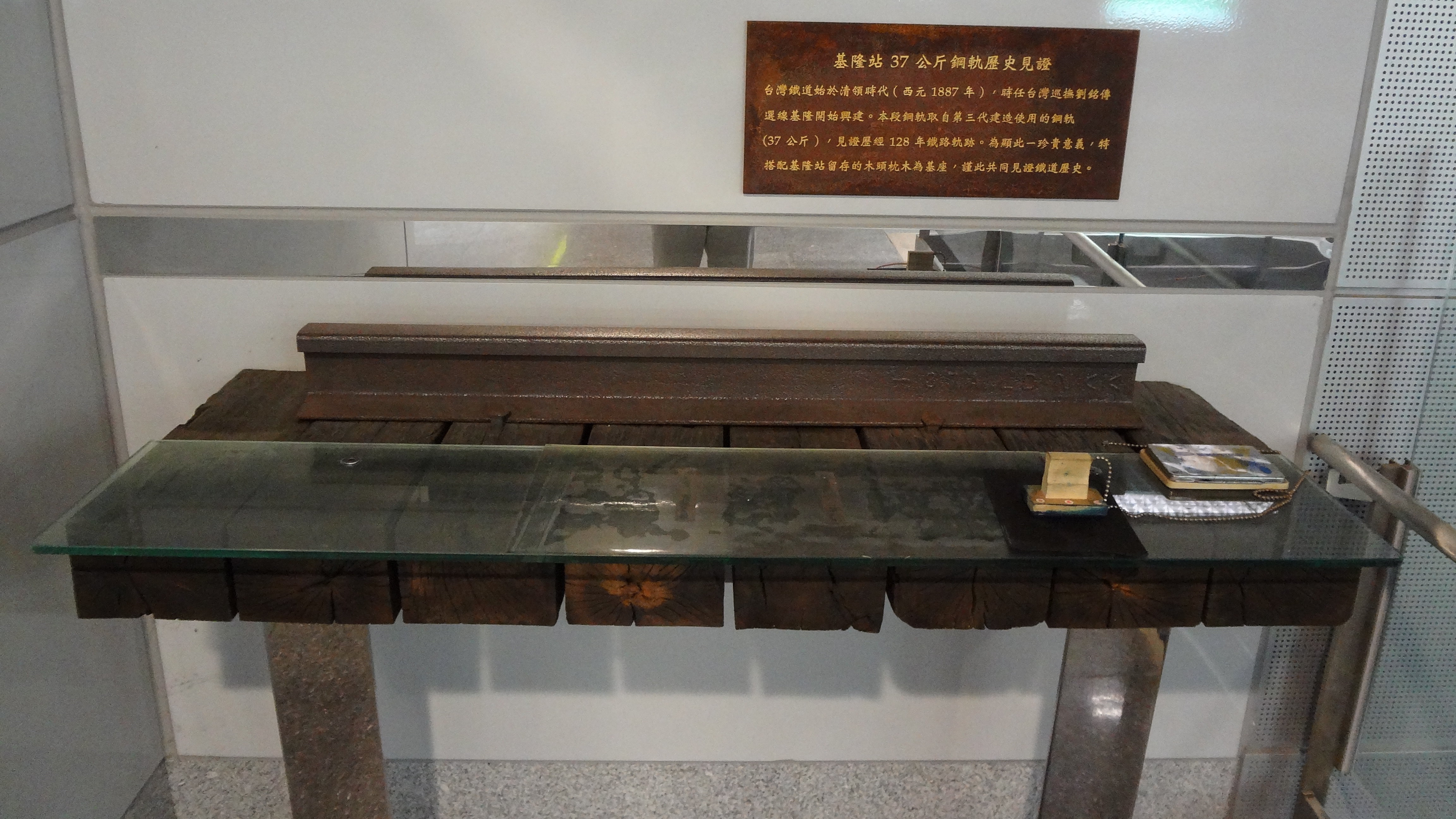 臺灣鐵路管理局基隆車站37公斤鋼軌歷史見證。